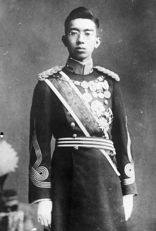 Bomben-Attentat auf den japanischen Kaiser! Der japanische Kaiser Hirohito, auf den während seiner Rückfahrt von einer Militär-Parade in Tokio ein Bomben-Attentat versucht wurde. Die Bombe traf aber nicht den Wagen des Kaisers. Der Attentäter, ein Koreaner, wurde verhaftet.